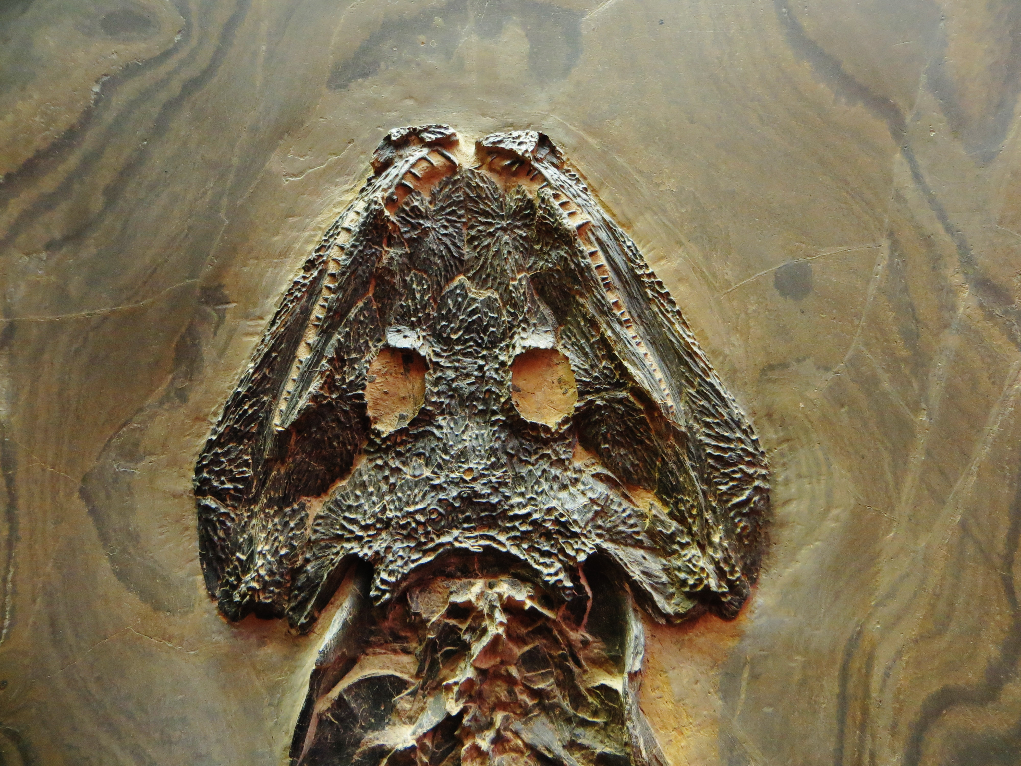 Fossil of Sclerocephalus- Took the picture at Natural History Museum, Mainz